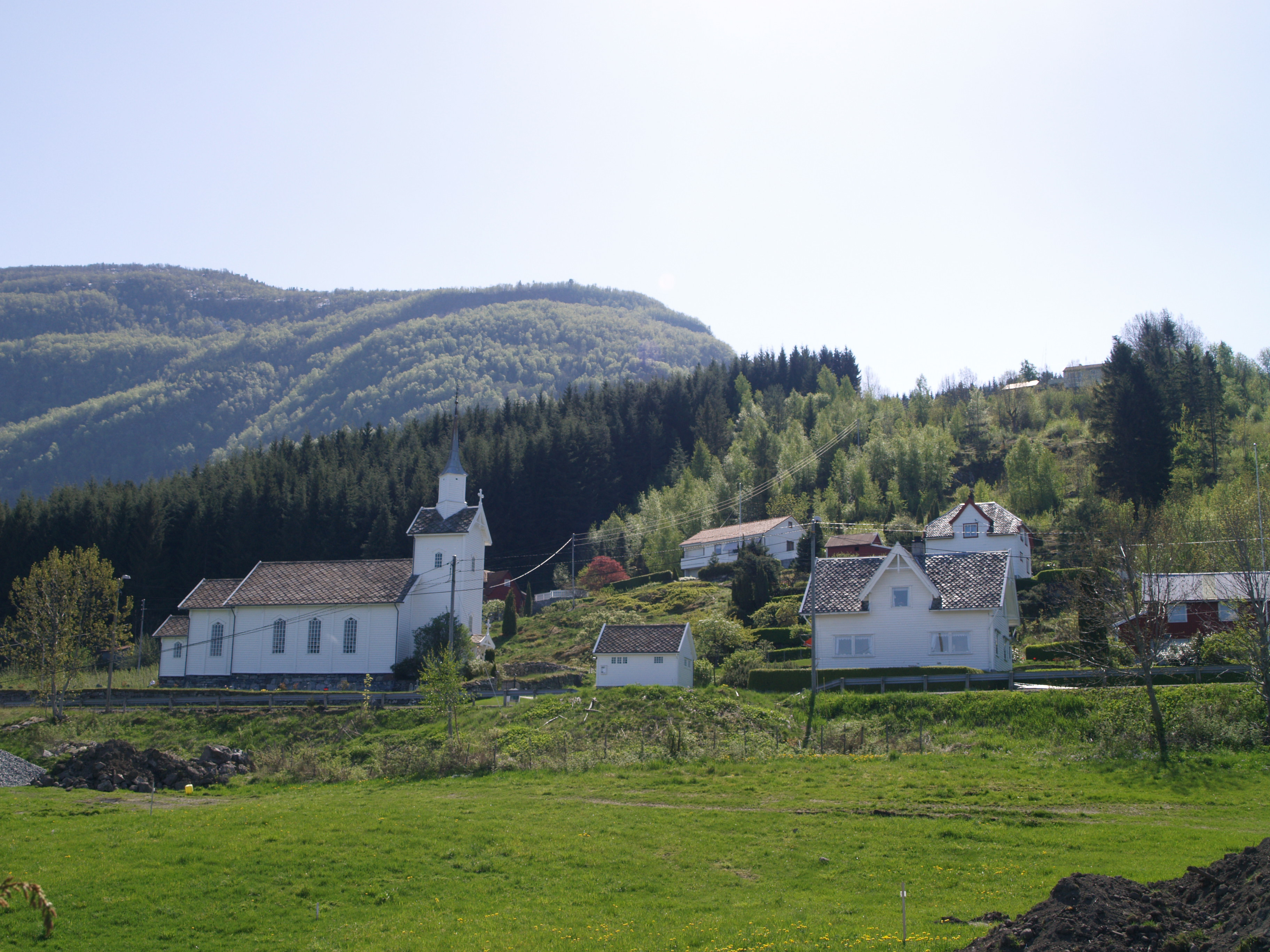 Feios kyrkje sett fra Rindesneset